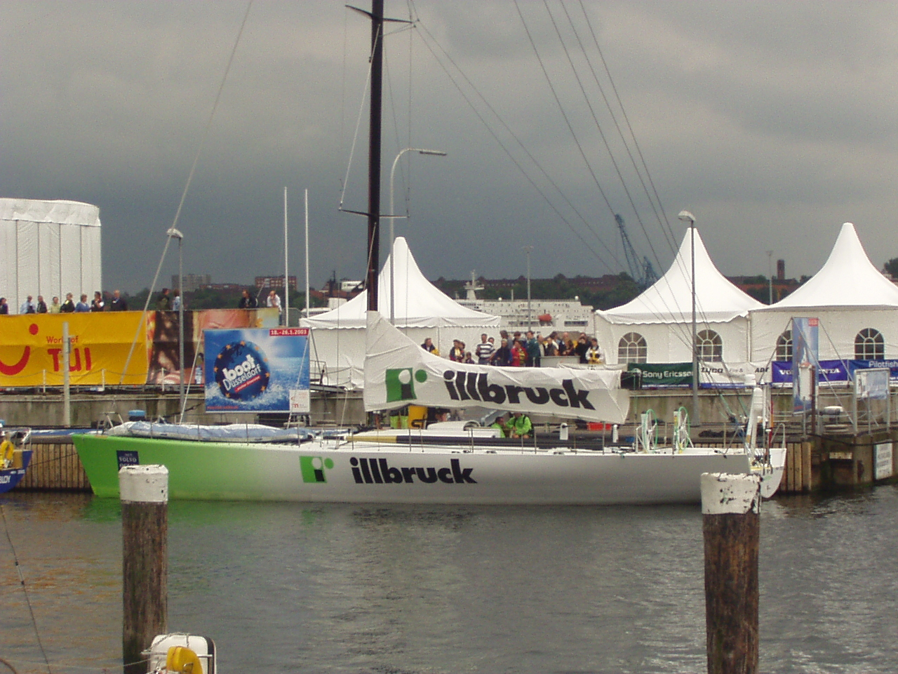 Gewinner des Ocean Race im Zielhafen Kiel